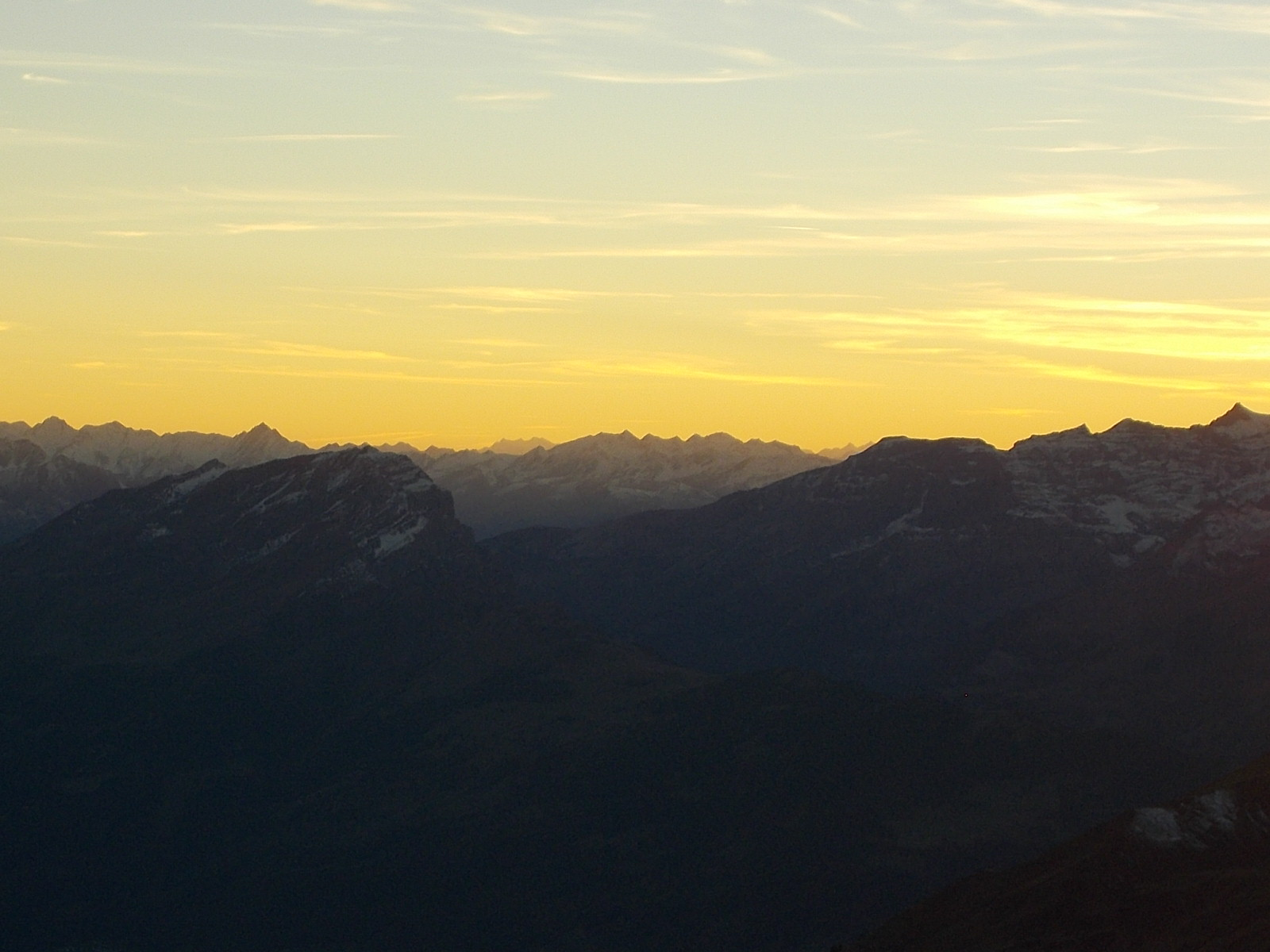 Fernblick von der Schesaplana - Südschulter: Monte Rosa (links der Mitte), Alphubel, Täschhorn, Dom (rechts der Mitte), Piz Medel (3211 m) davor in der Mitte), Calanda (2806 m) im Vordergrund links, Ringelspitz (3247 m) am rechtem Bildrand